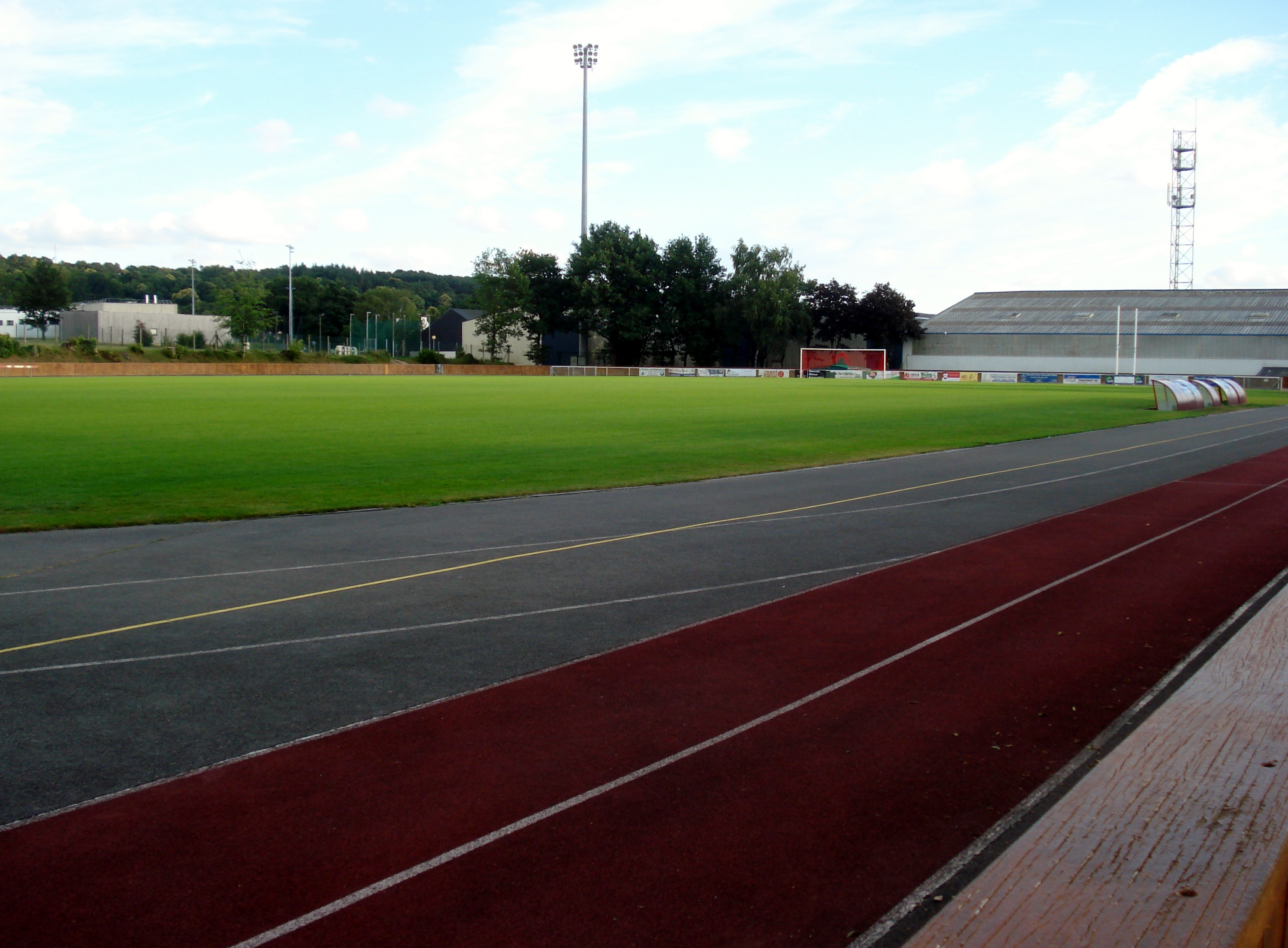 La pelouse du stade municipal du Pigeon Blanc à Locminé